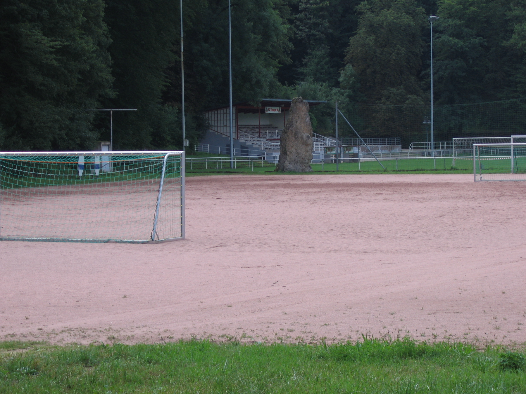 Landkreis Waldshut – Menhir beim Sportplatz Tiengen an der Wutach.